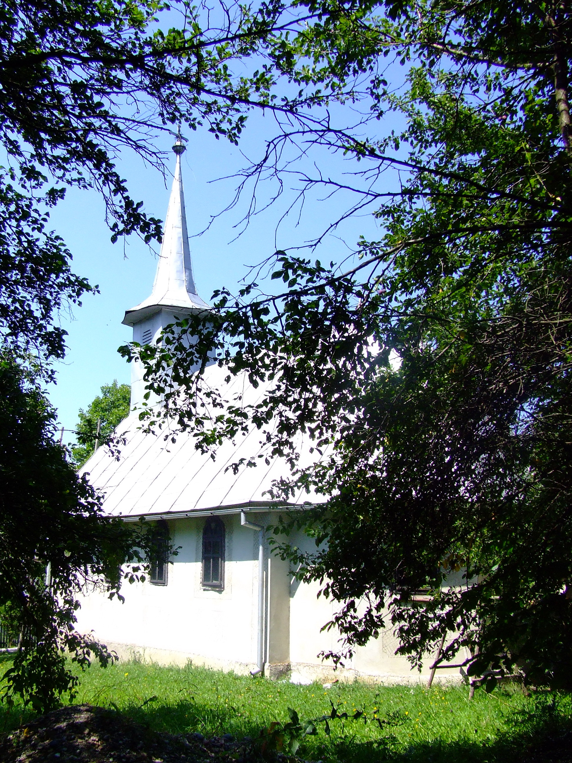 Biserica de lemn din Poiana Onţii, judeţul Sălaj. Vedere de ansamblu printre ramurile copacilor.